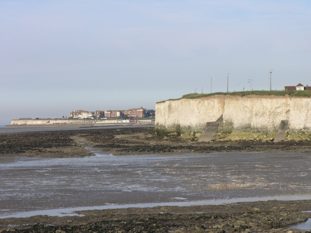 Epple Bay, Kent, England